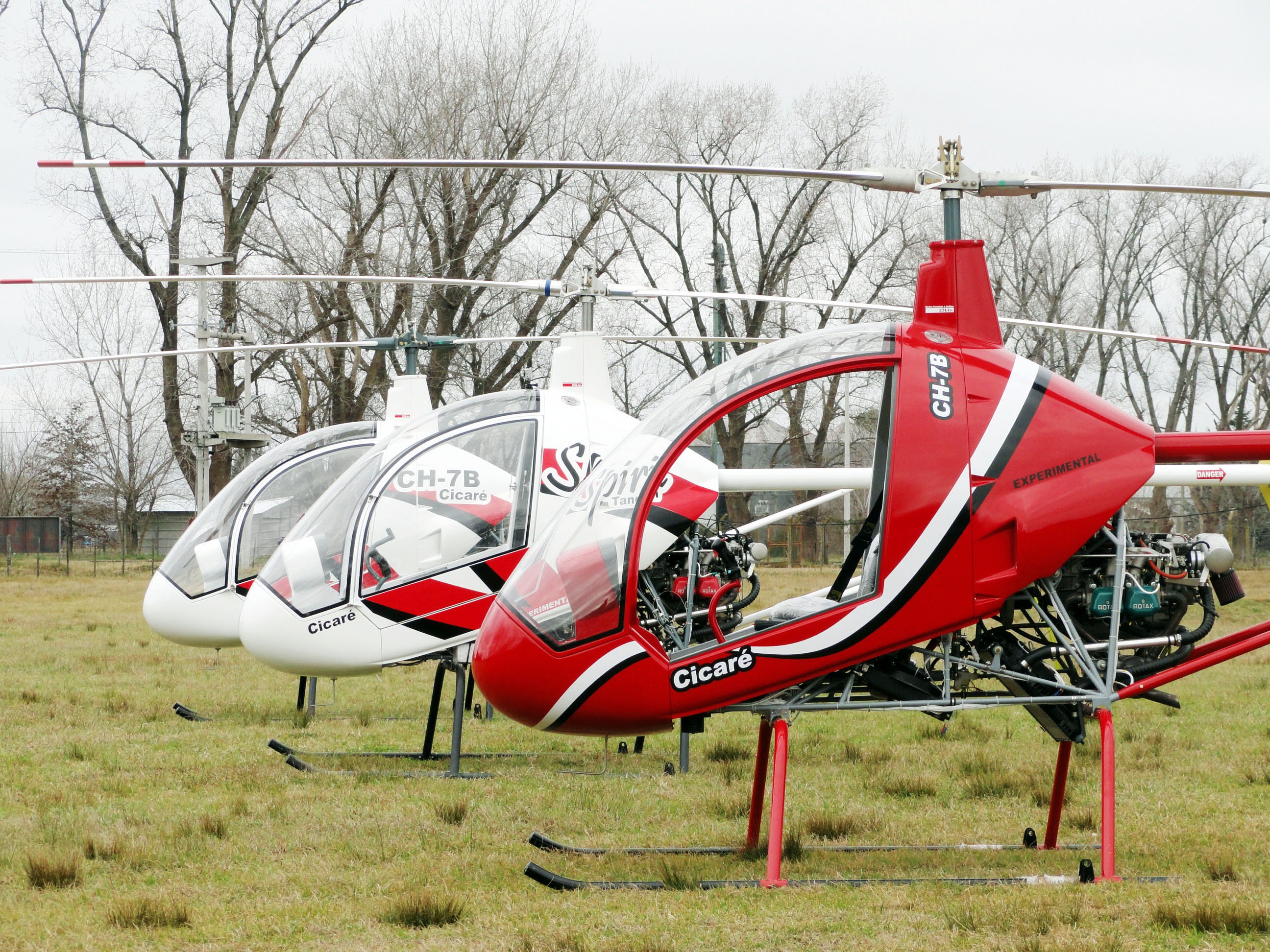 Cicaré CH-7